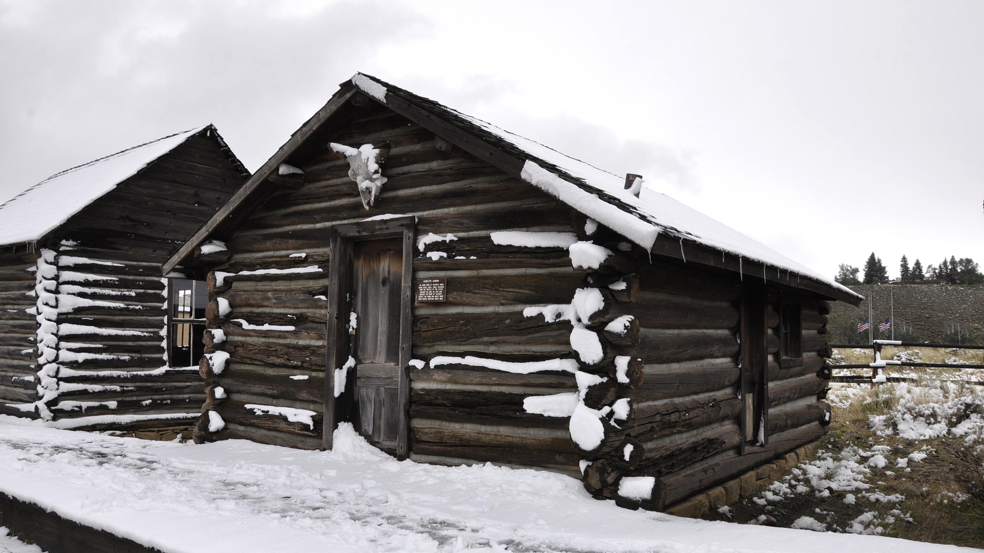 Cody, Wyoming - Old Trail Town - Curly's Cabin